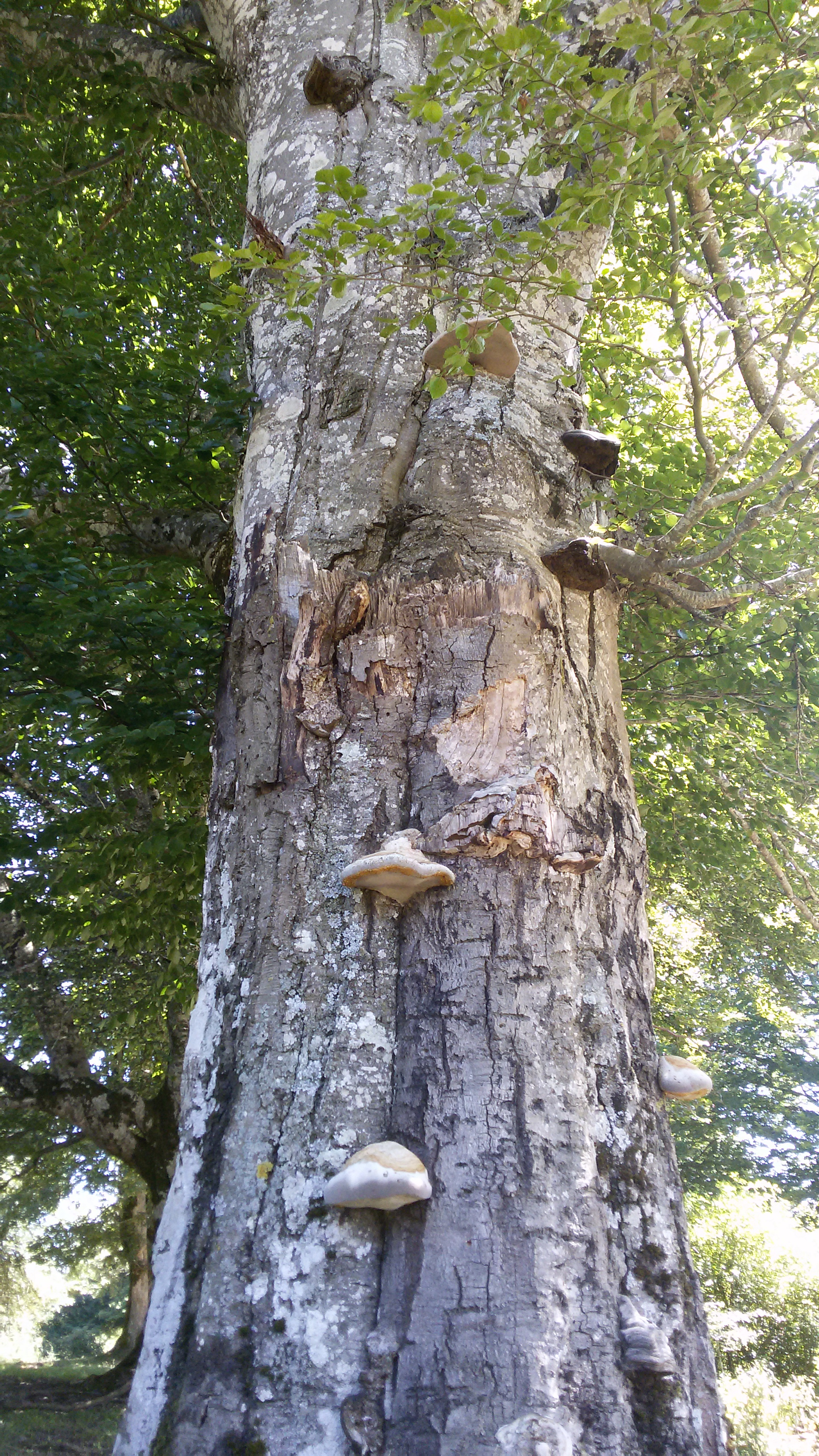 Hainbat ardagai ikusten dira Urbasako pago baten enborrean